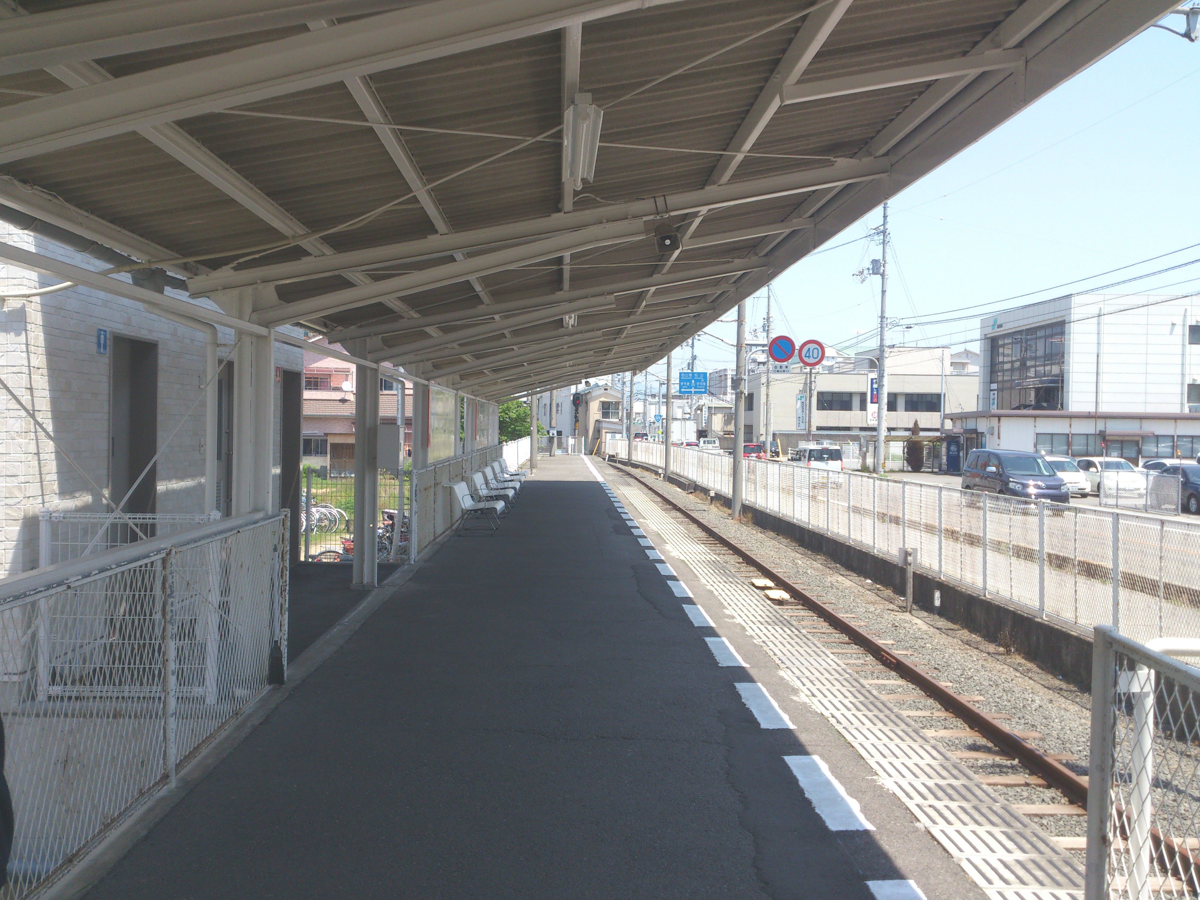 伊予鉄道 郡中港駅のホームです。